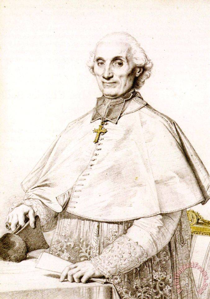 Monseigneur Gabriel Cortois de Pressigny, dernier évêque de Saint-Malo, et archevêque de Besançon